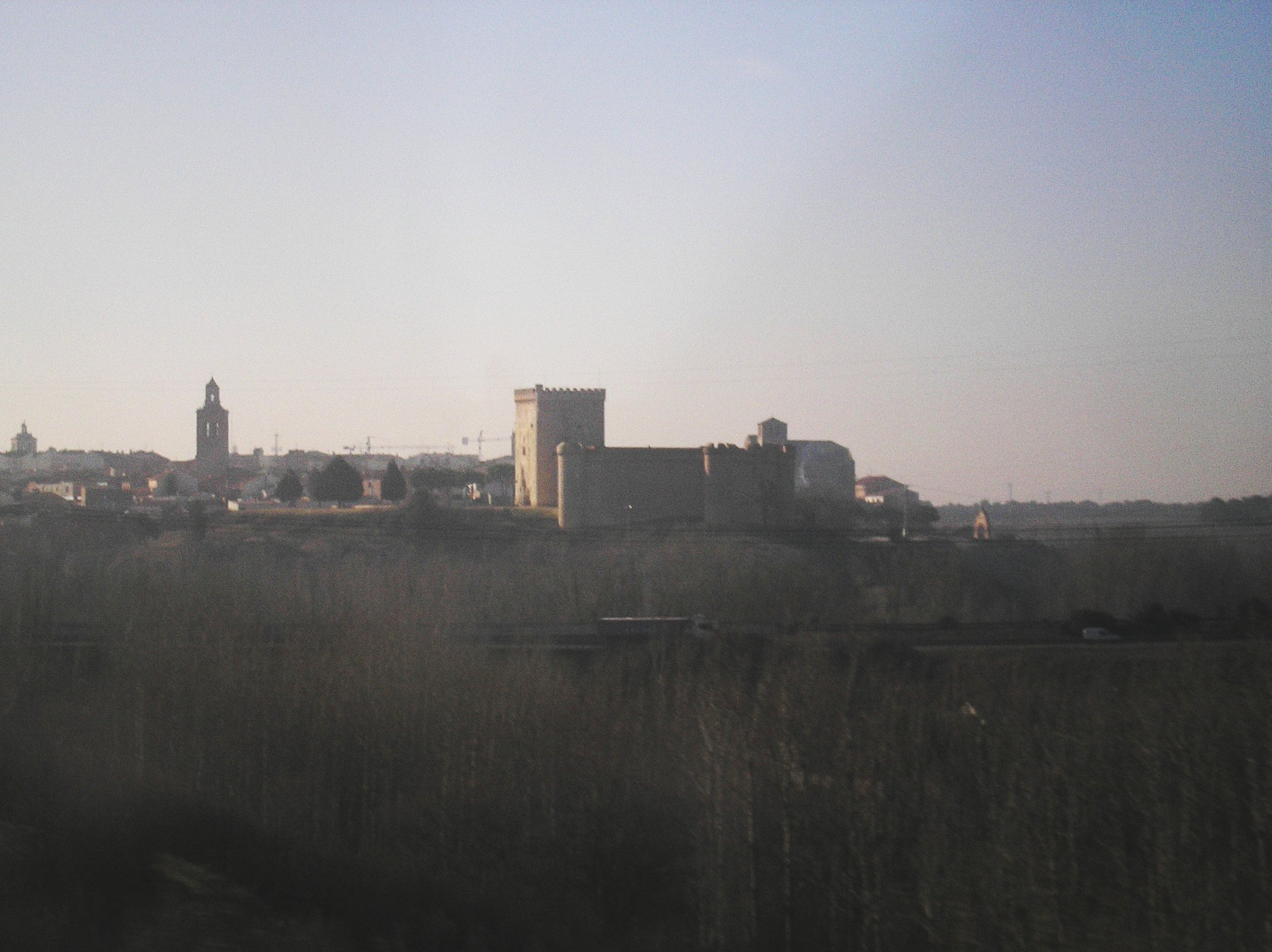 Ciudad y castillo de Arévalo vistas desde la línea de ferrocarril Madrid-Norte, la foto esta sacada de lejos para no mostrar como esta la ladera de l rio ni lo el penoso estado de la explanada del castillo OBRAS PARALIZADAS. Castillo y ciudad de Arévalo. Provincia de Ávila, España. Vistas desde el ferrocarril Ávila-Valladolid. -- City and castle of Arévalo. Province of Ávila, Spain. Seen from Avila-Valladolid train. -- Foto tomada por Jorge González. Picture taken by Jorge González.